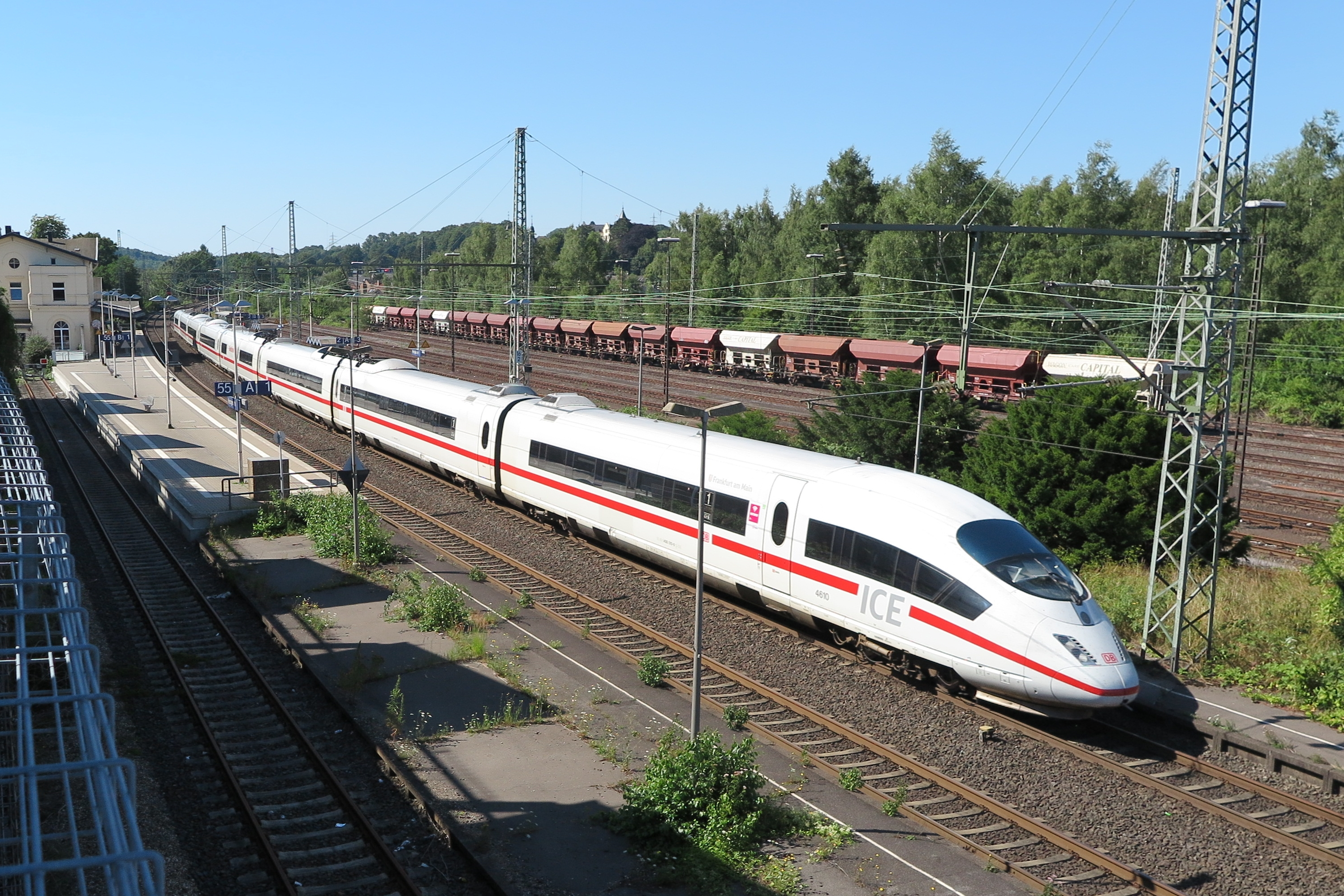 Bahnhof Herzogenrath mit dem Hochgeschwindigkeitszug ICE3 16 an Gleis 2 auf der Fahrt von Frankfurt (Main) Hbf nach Brüssel Süd.